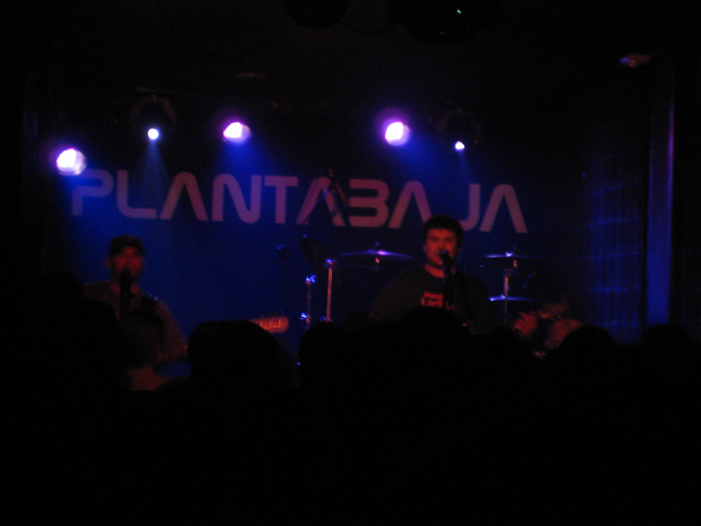 Dos de los miembros viriles de Mamá Ladilla: Ferro está entre las sombras.